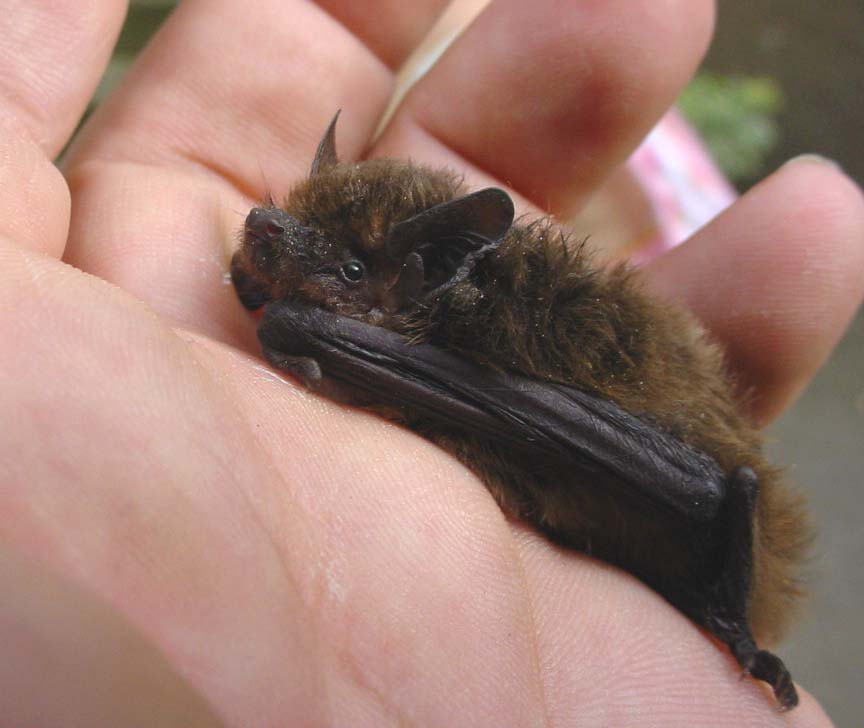 Zwerg-Fledermaus (Pipistrellus pipistrellus)